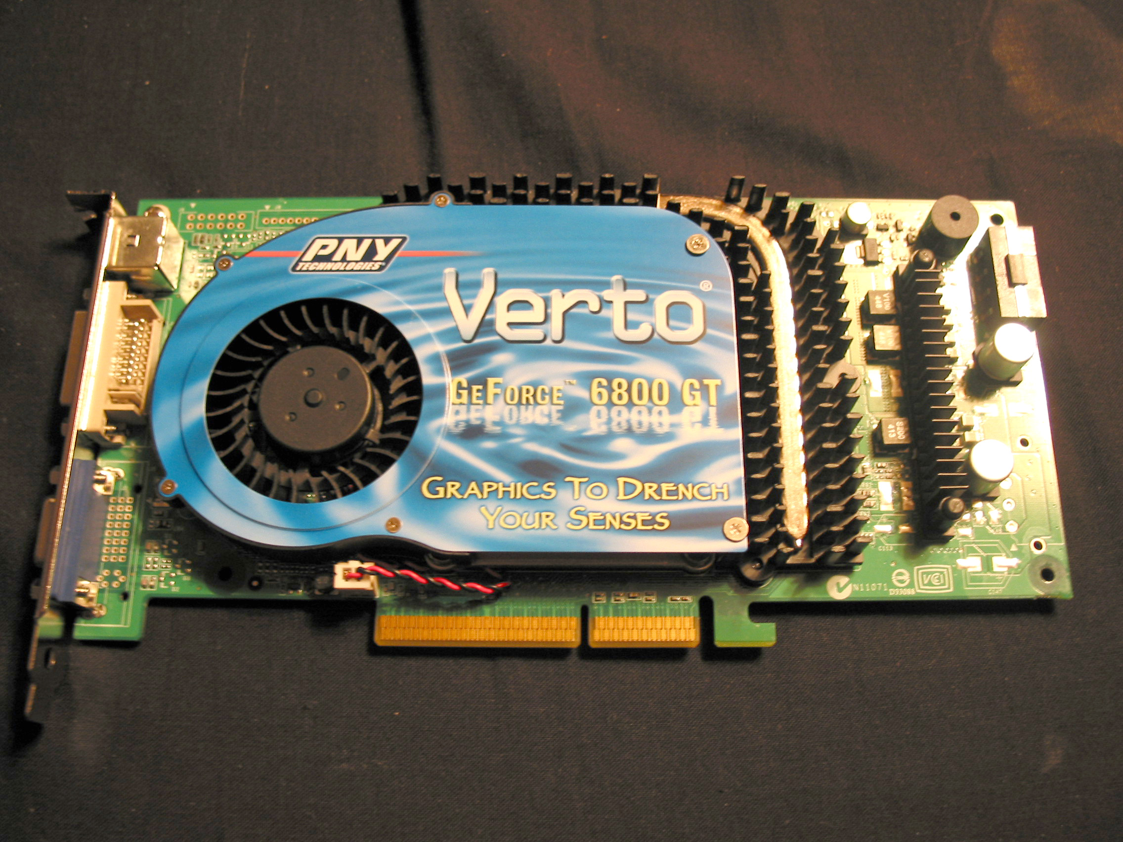 Nvidia PNY Verto Geforce 6800 GT